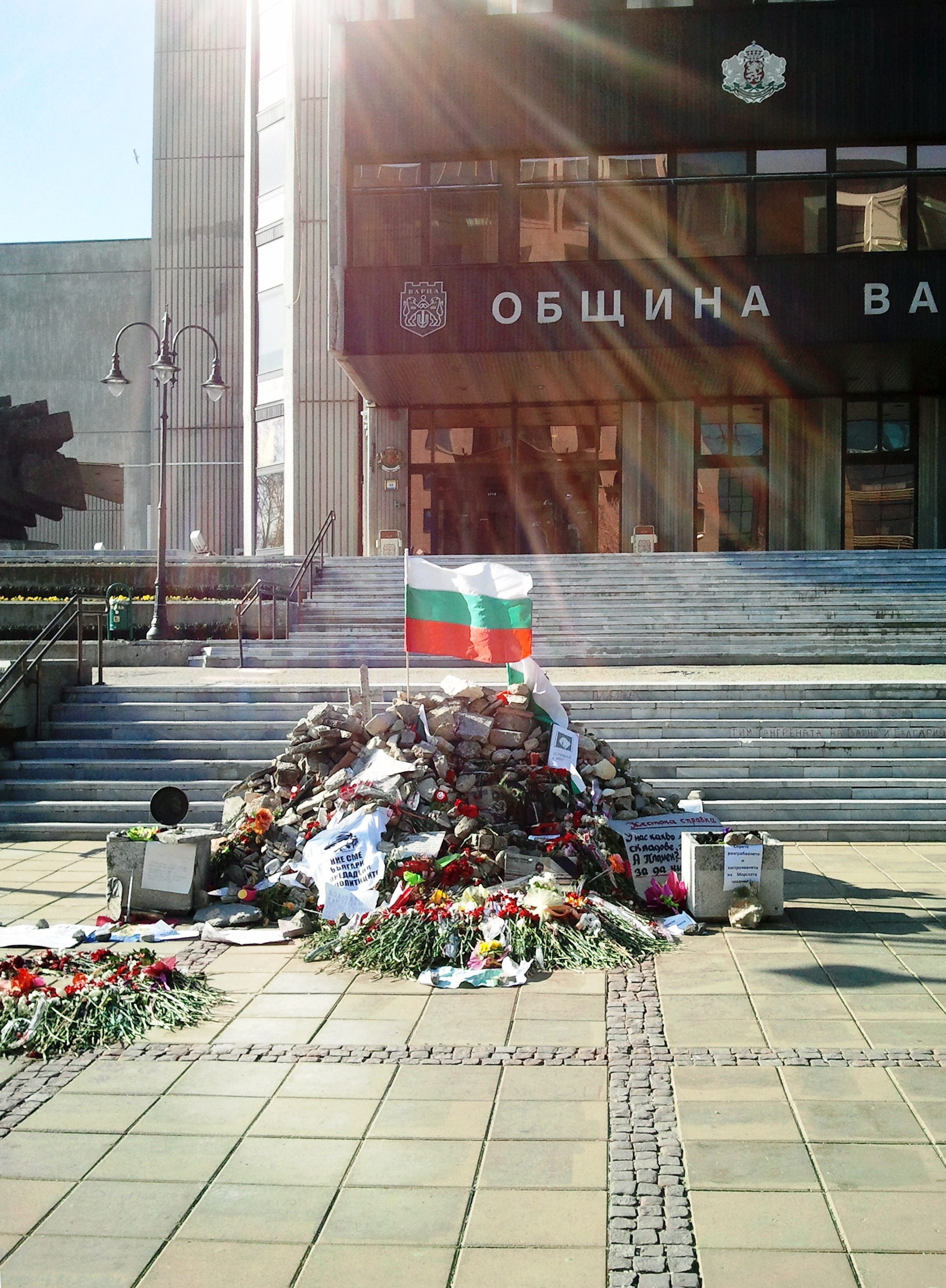 Цветя върху камарата от камъни на стълбите пред общината, където на 20 февруари 2013 г. в 7:30 сутринта се самозапали Пламен Горанов. Вдясно - постер за продължаващото разграбване и застрояване на Морската градина на Варна от петицията за Черноморското крайбрежие